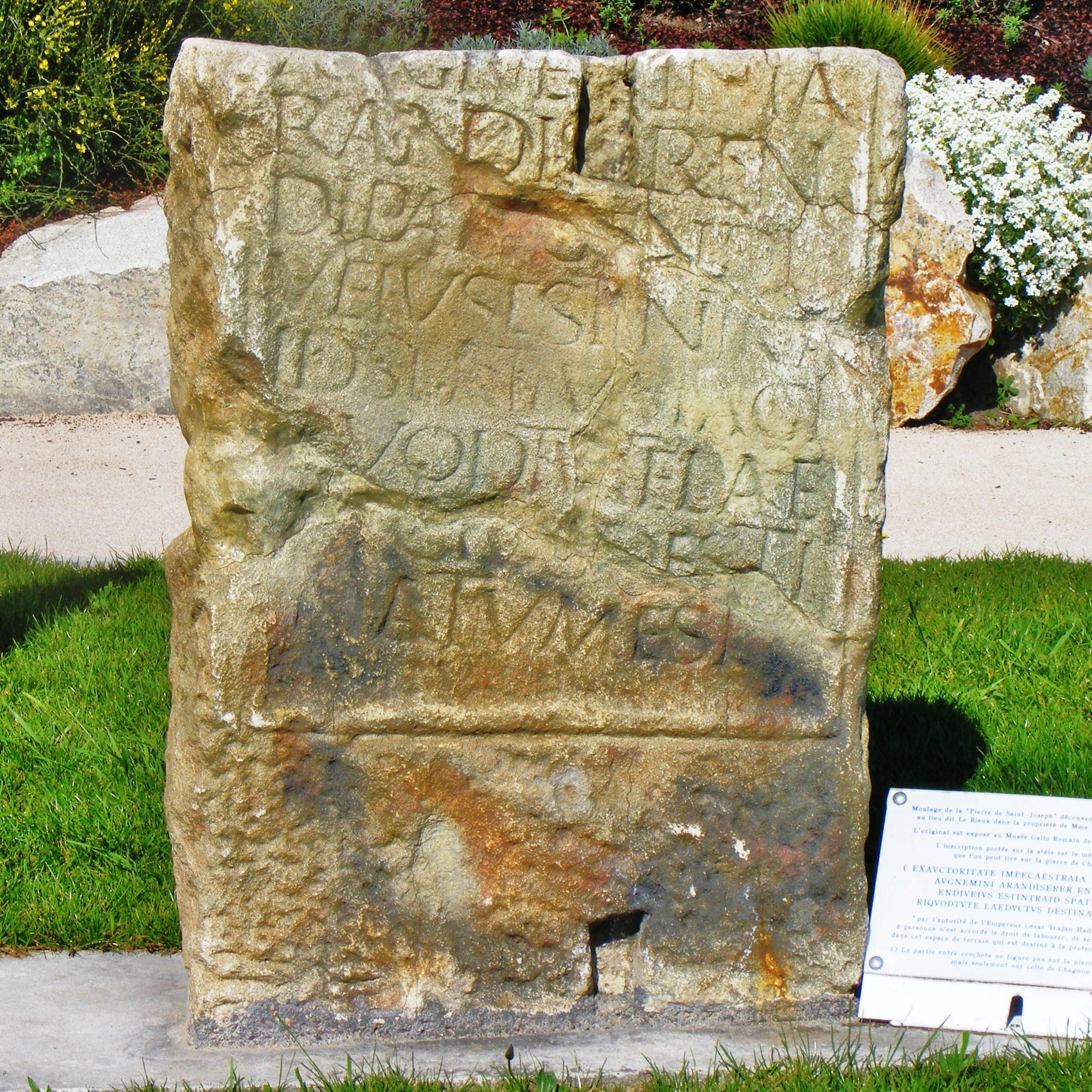 La pierre du Rieu, II° Siècle après J.C. (reproduction). Aqueduc romain du Gier. Référence : AE 1999, 1053